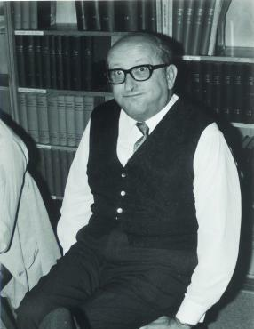 Georges Reeb 1970 in Oberwolfach.